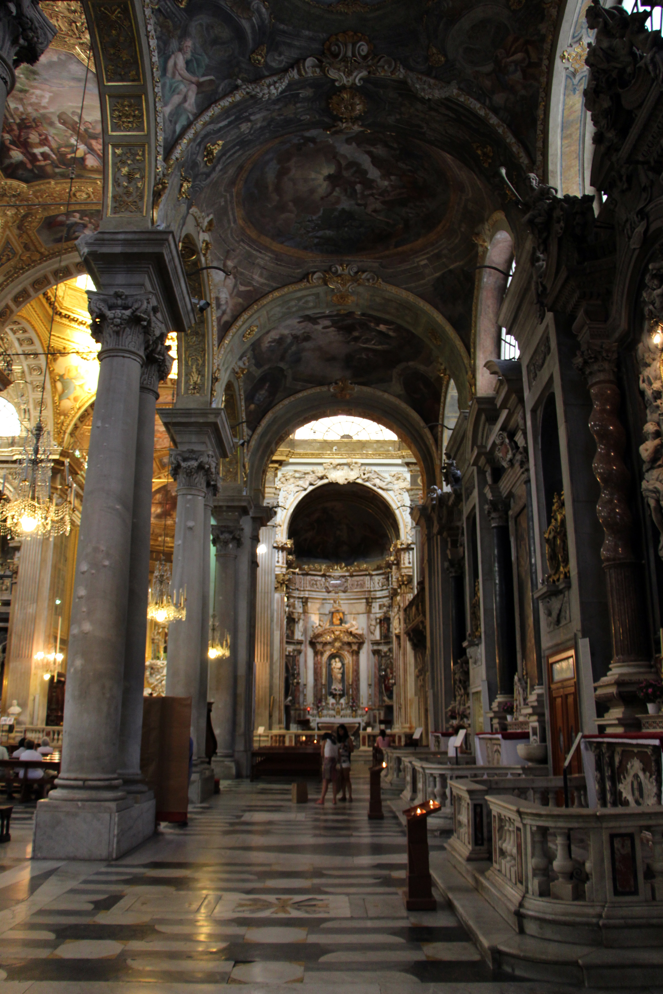 Santa Maria delle Vigne (Genova) The making of this document was supported by Wikimedia CH. (Submit your project!) For all the files concerned, please see the category Supported by Wikimedia CH.